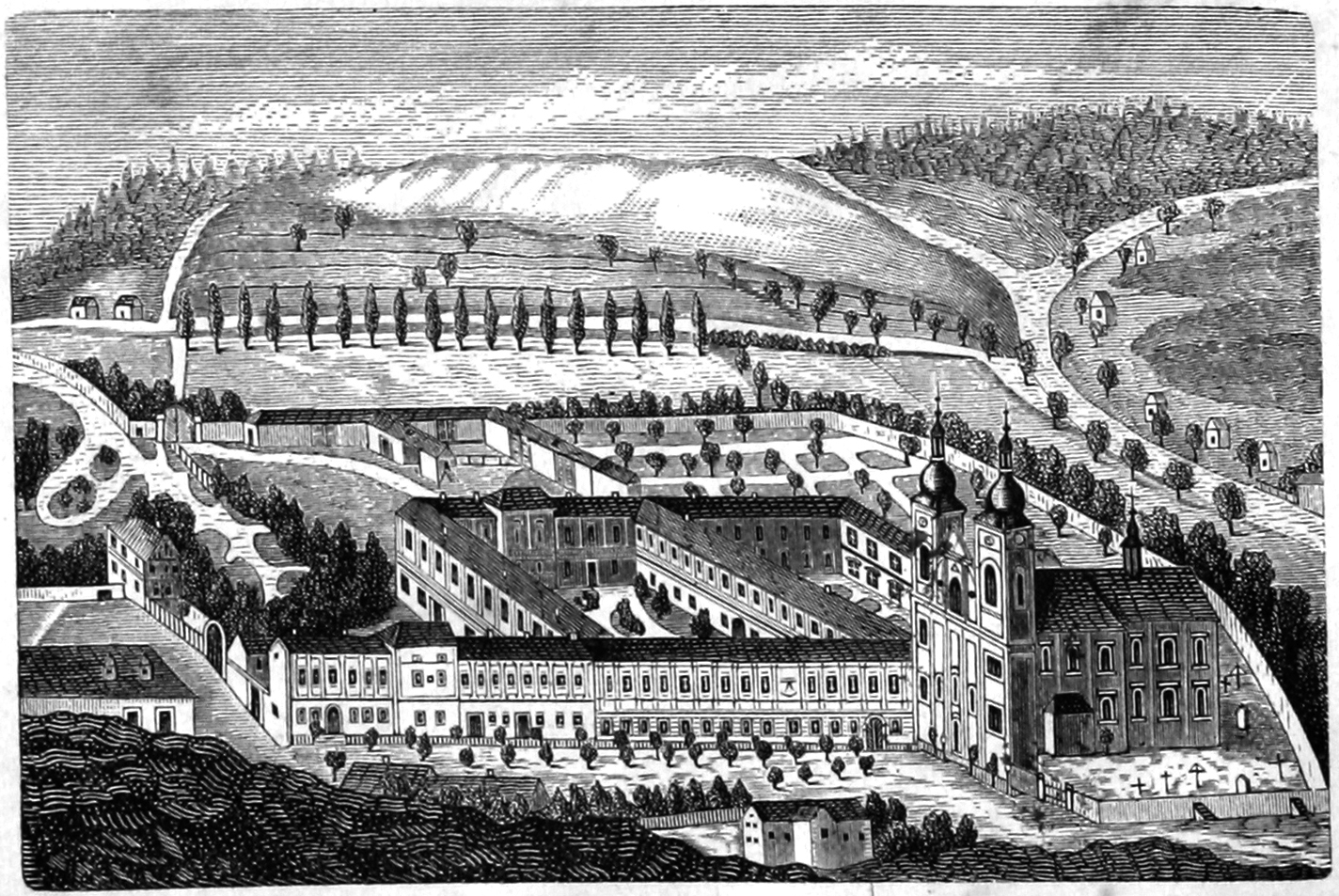 Premonstrátský mužský klášter Nová Říše.